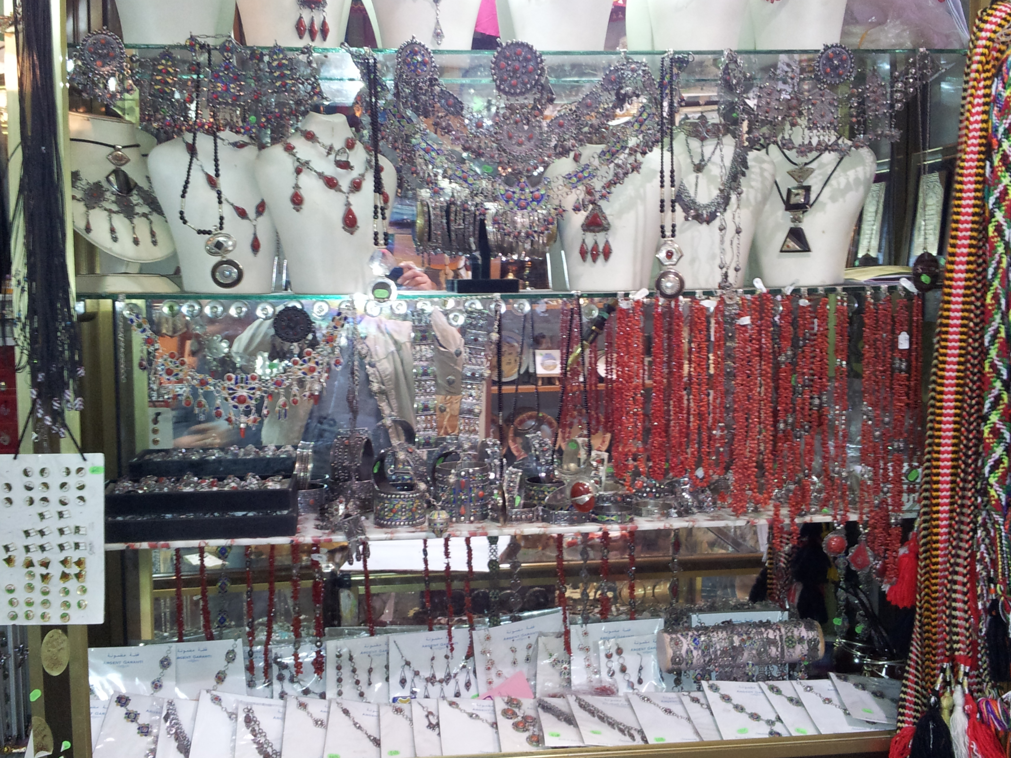 Bijouterie kabyle (Artisanat algérien)